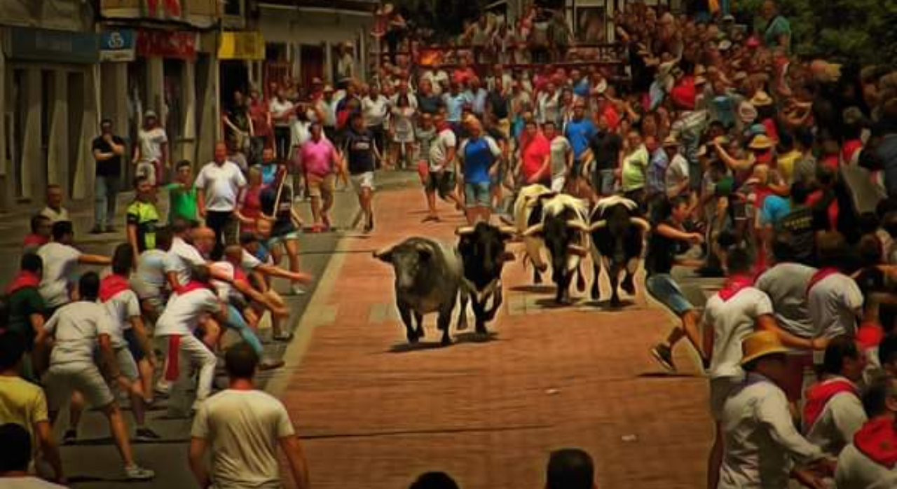 Encierro por las calles de Coria